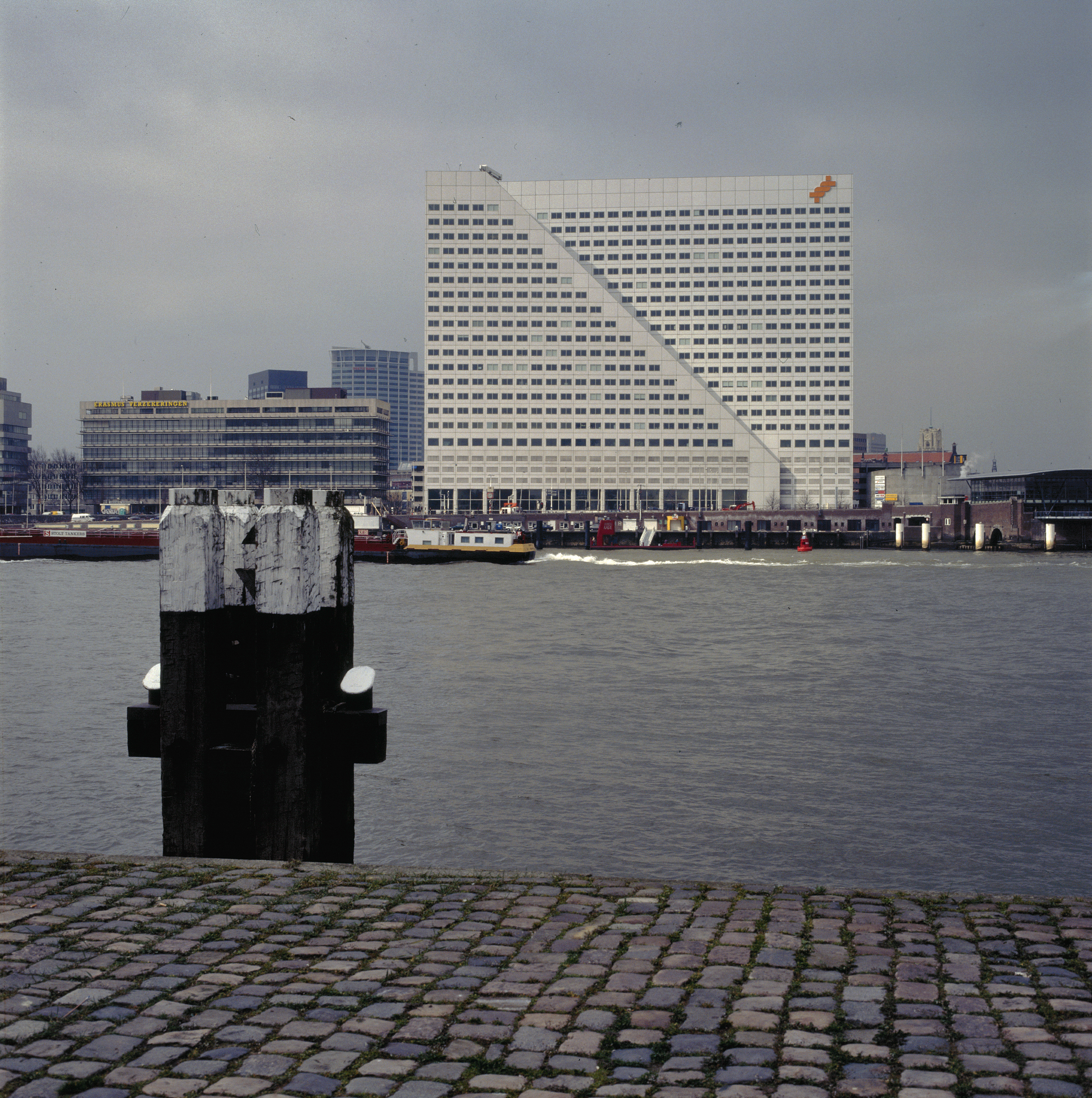 Willemswerf: Overzicht over de Maas met gebouw Willemswerf (arch.: Wim Quist) vanaf de kade